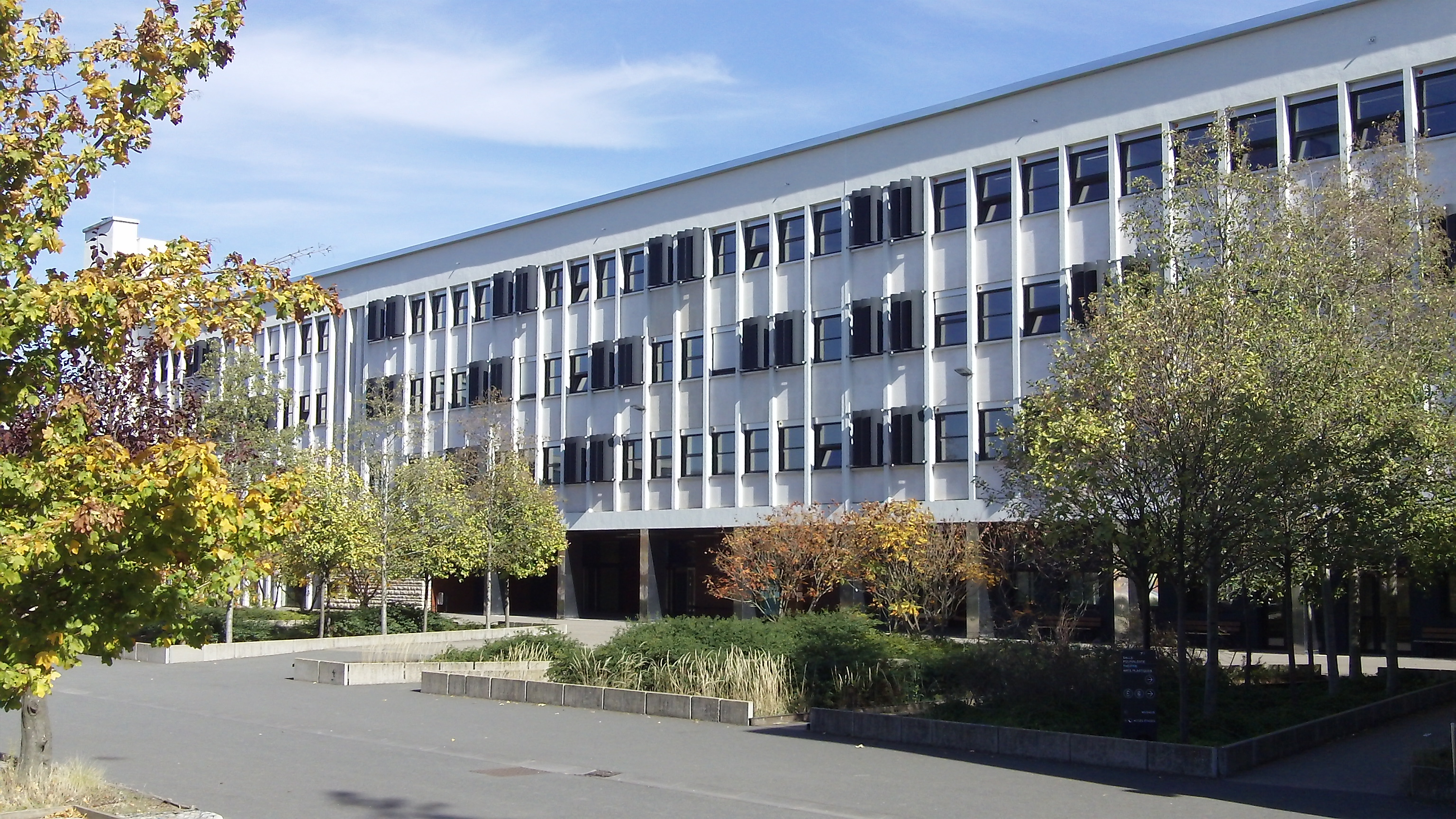 Cité Scolaire Sait-Exupéry Lyon